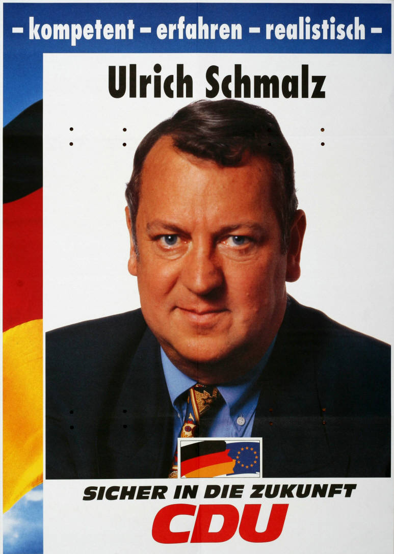 kompetent - erfahren - realistisch - Ulrich Schmalz Sicher in die Zukunft CDUAbbildung:Porträtfoto - NationalfarbenPlakatart:Kandidaten-/Personenplakat mit PorträtObjekt-Signatur:10-001: 4061Bestand:Plakate zu Bundestagswahlen (10-001)GliederungBestand10-18:Plakate zu Bundestagswahlen (10-001) » Die 13. Bundestagswahl am 16. Oktober 1994 » CDU » Mit PorträtfotoLizenz:KAS/ACDP 10-001: 4061 CC-BY-SA 3.0 DE